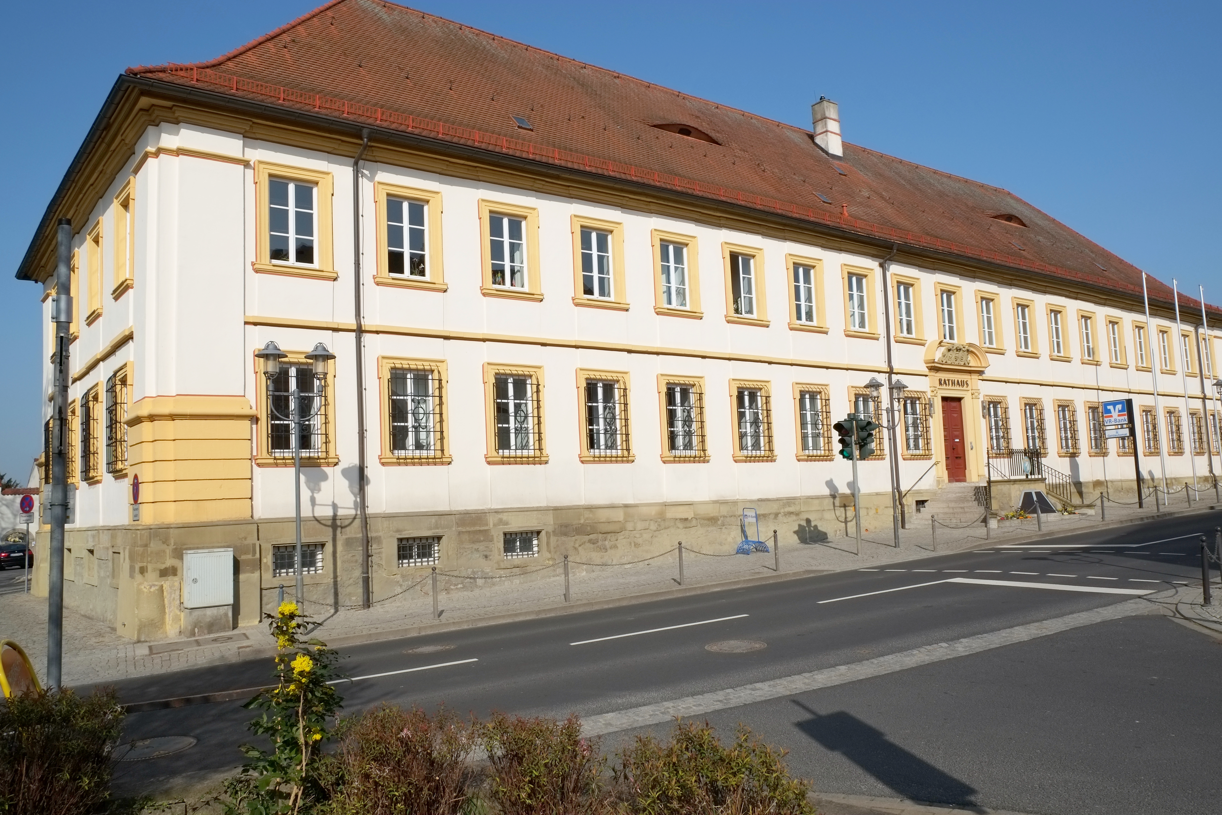 Rathaus in Giebelstadt im Landkreis Würzburg (Bayern, Deutschland)